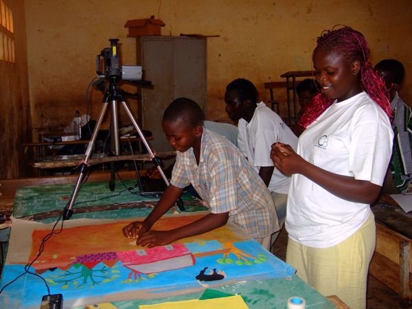 16 enfants Burkinabés ont réalisés avec Louise-Marie Colon de Camera-etc, le film "Leila". Une production Camera-etc. Voir le film